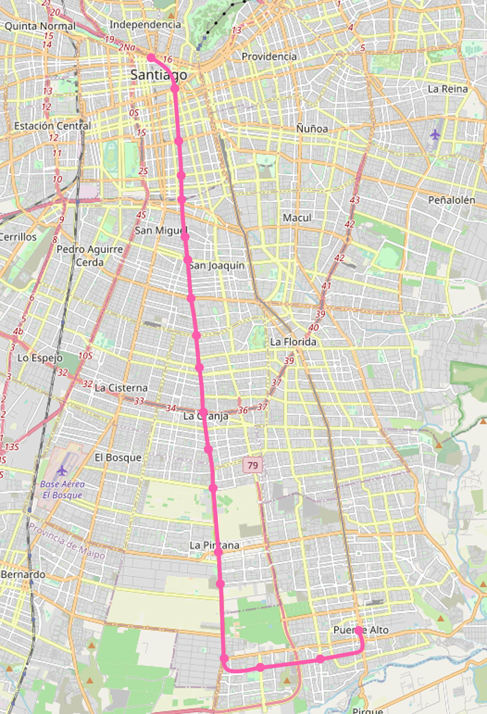 Mapa con el recorrido de la Línea 9 del Metro de Santiago